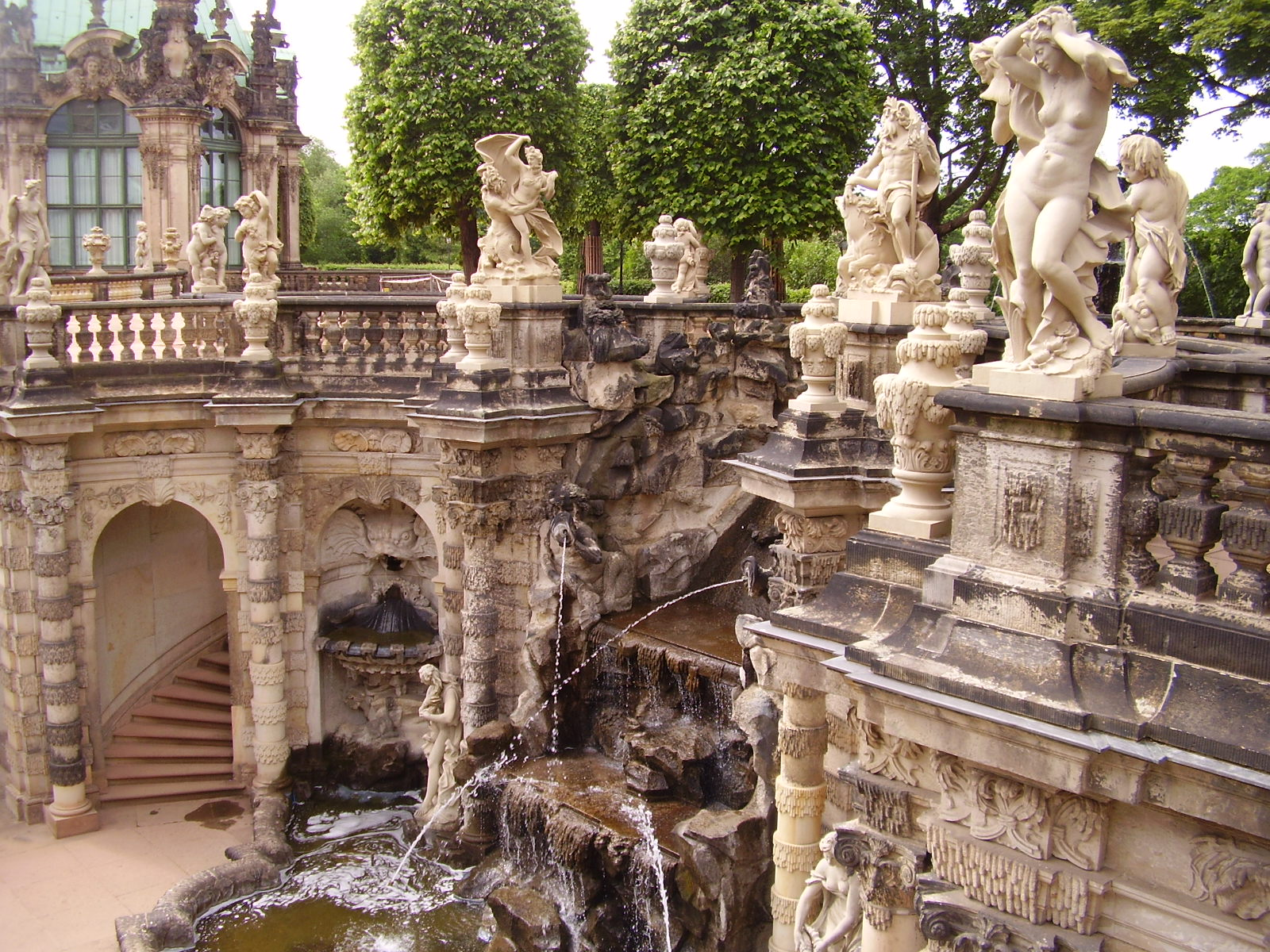 Vista de Nymphenbad en Dresden